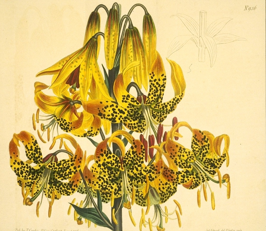 Amerikanische Türkenbundlilie - Lilium superbum Summary Curtis Botanical Magazine US Department of Agriculture Text and images in this presentation are not copyrighted, and may be used with attribution to the National Agricultural Library, ARS, USDA. National Agricultural Library, ARS, USDA